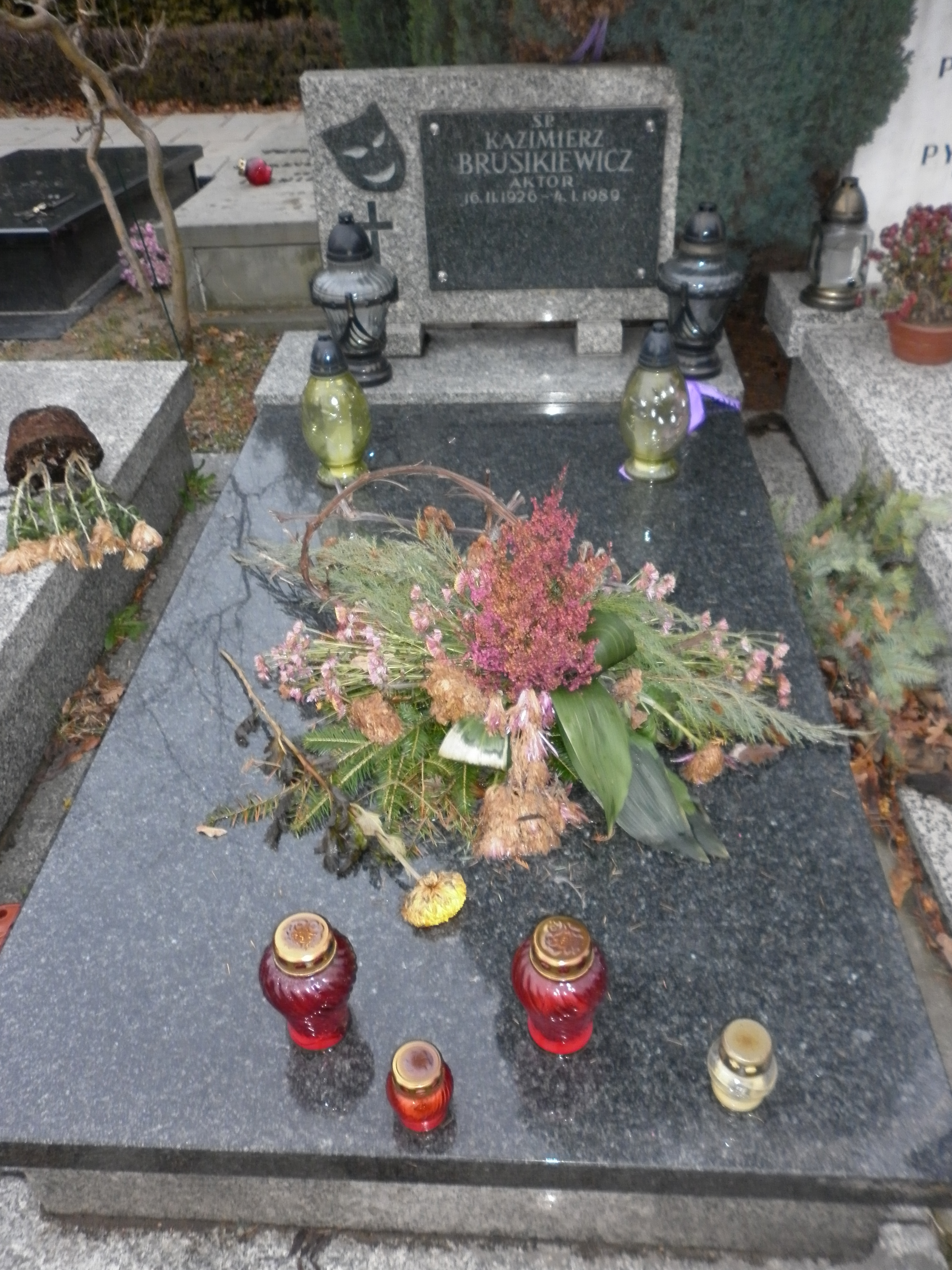 Grób Jarosława Busikiewicza na Wojskowych Powązkach